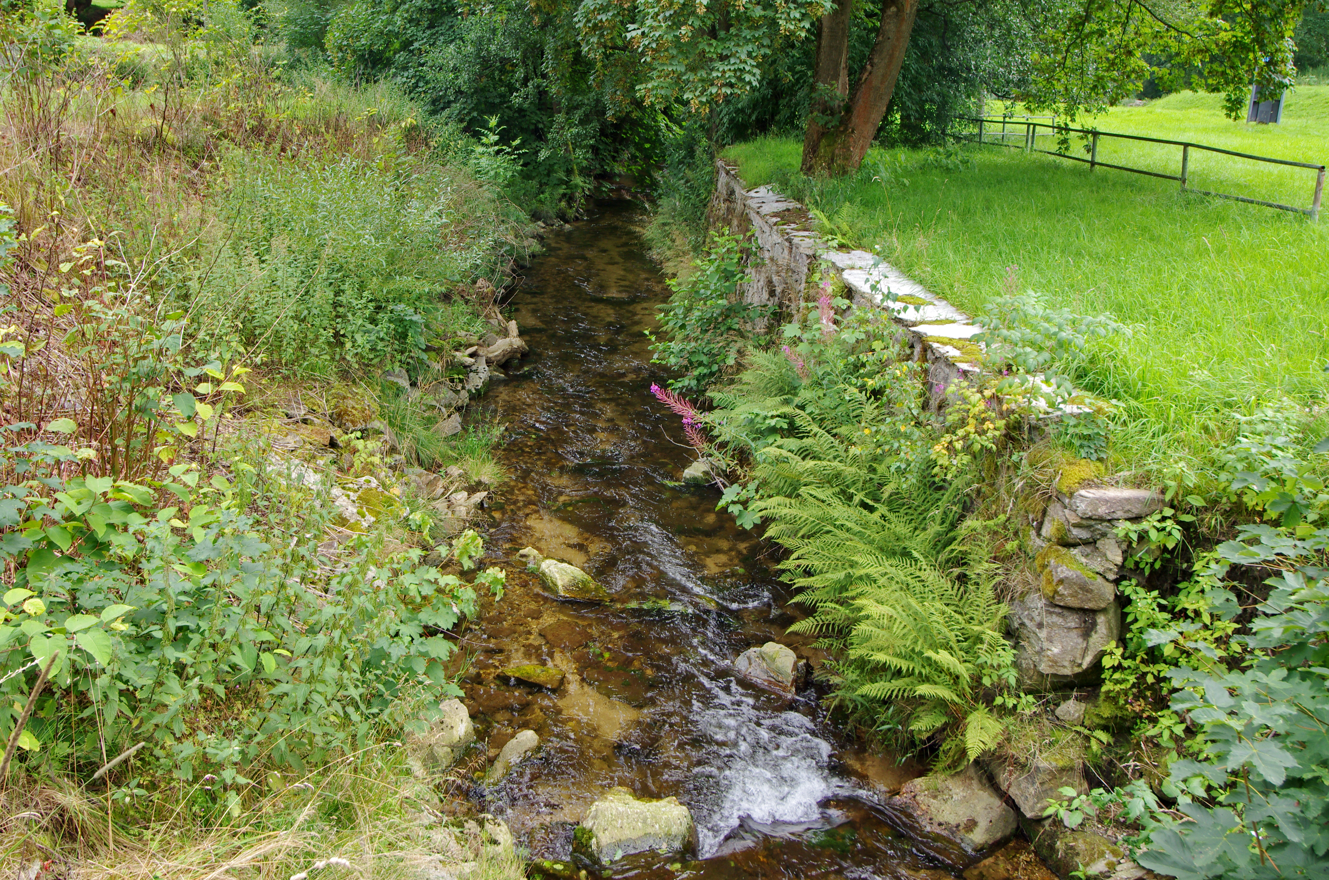 Stříbrný potok v obci Stříbrná v Krušných horách, okres Sokolov